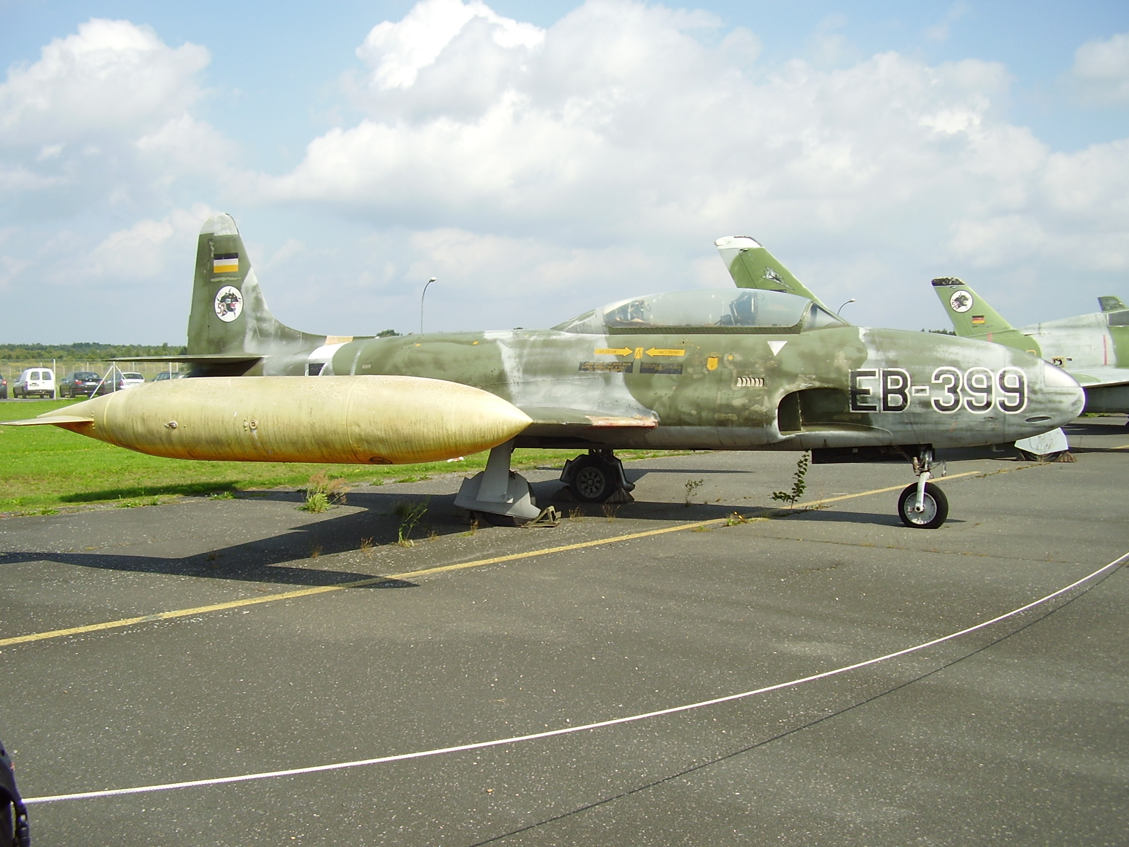 Luftwaffenmuseum der Bundeswehr; Airforce Museum of the Bundeswehr; Berlin-Gatow, Lockheed T-33A